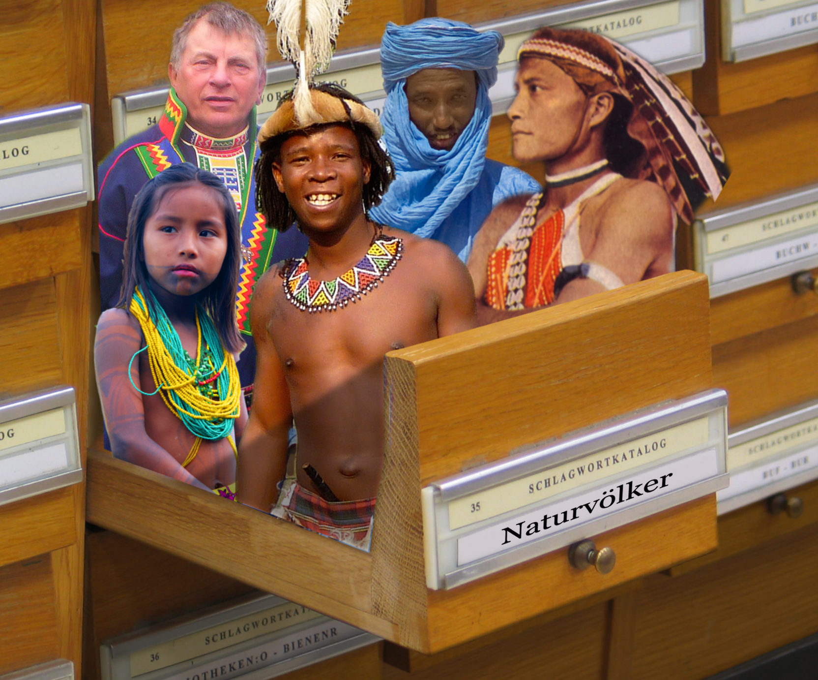 Schubladendenken ist das Bilden von Kategorien, die durchaus nicht korrekt sein müssen, wie im Beispiel die „Naturvölker". Dieser Begriff ist abwertend und irreführend und wird in der Wissenschaft nicht mehr verwendet.